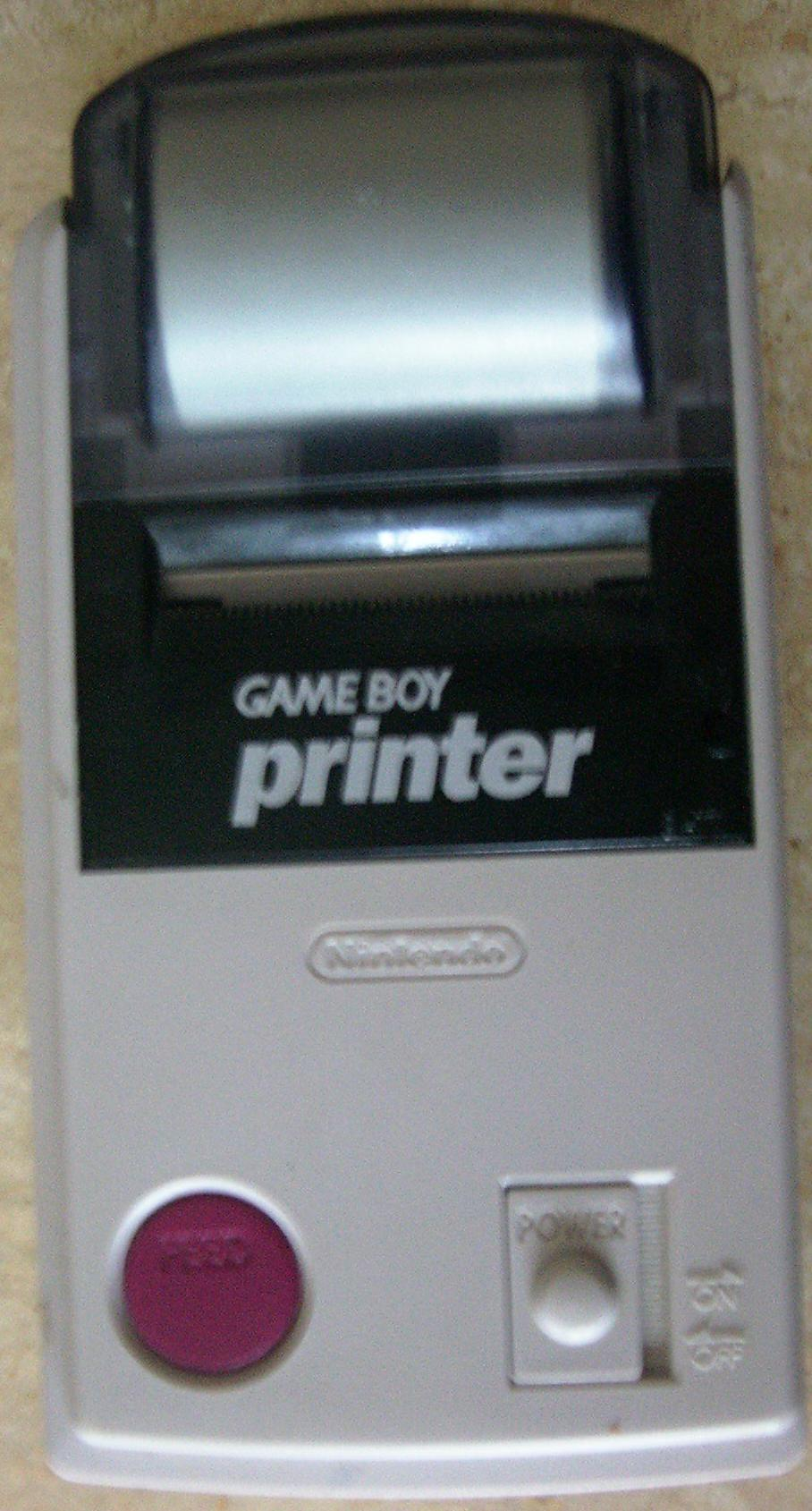 Nintendo Game Boy Printer